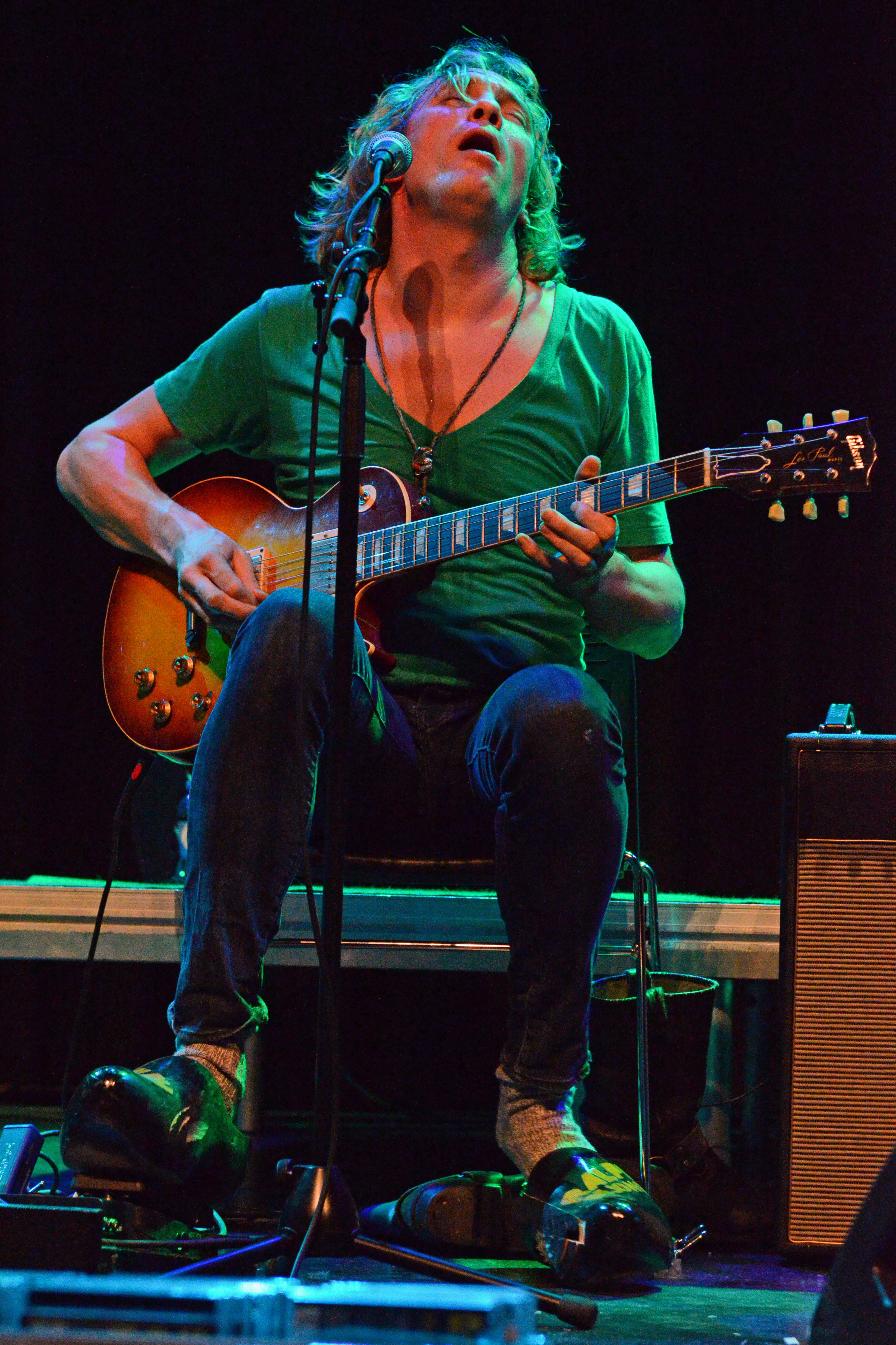 Live in Blues Route Helmond 25-10-2015, waar hij live speelt met zijn klompen als percussie.